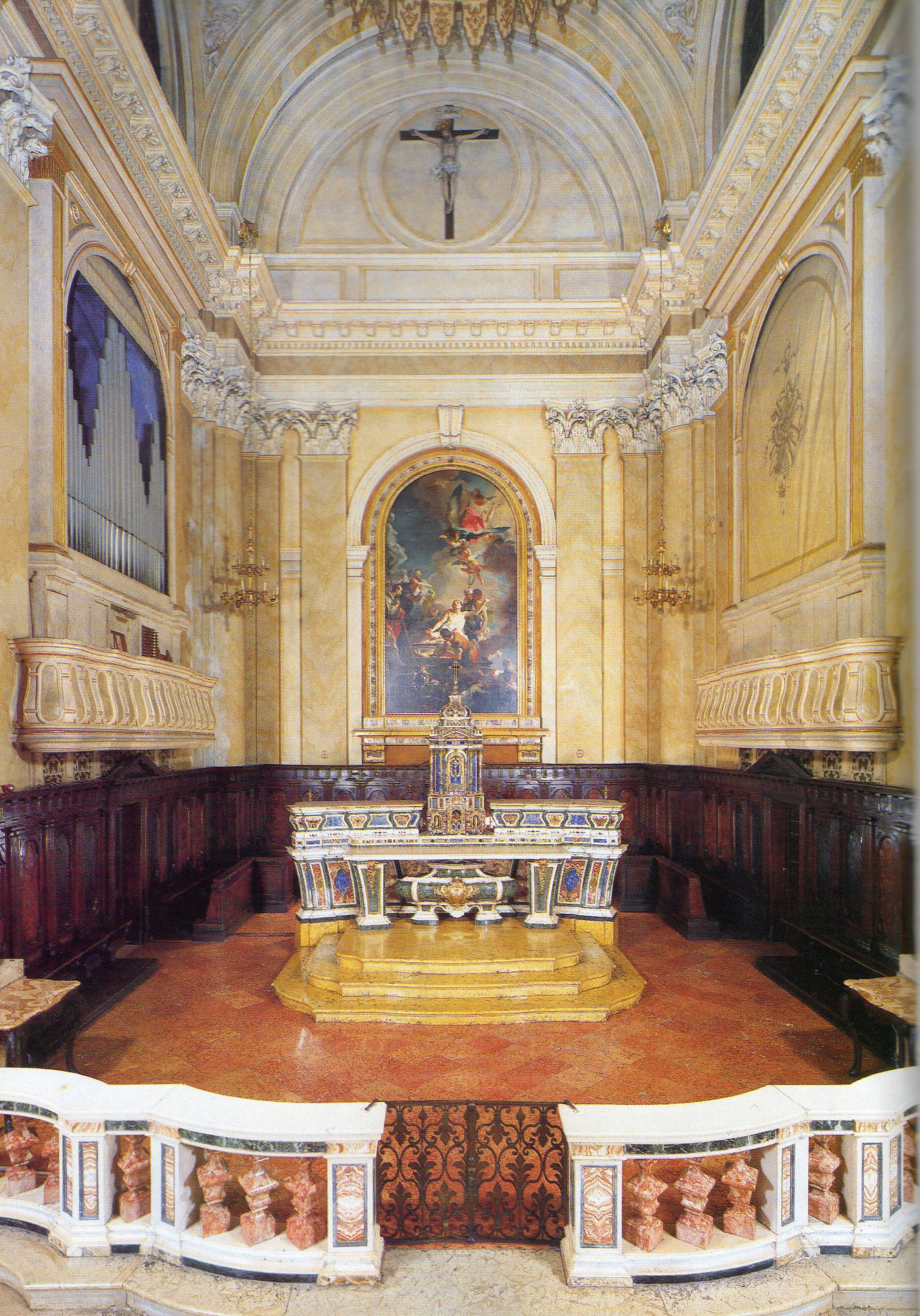 San_lorenzo_brescia_presbiterio.jpg